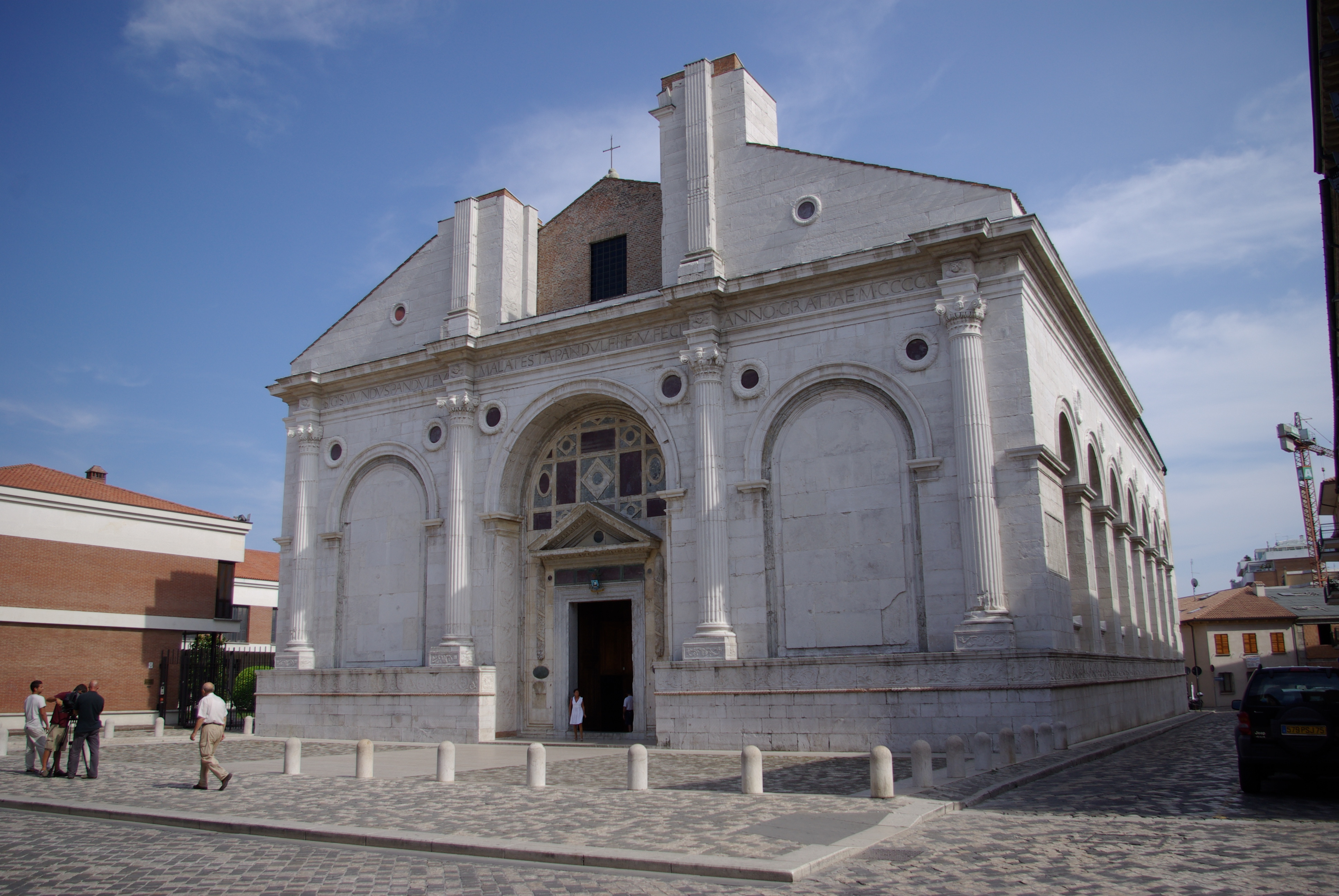 Tempio Malatestiano - MIBAC This is a photo of a monument which is part of cultural heritage of Italy.